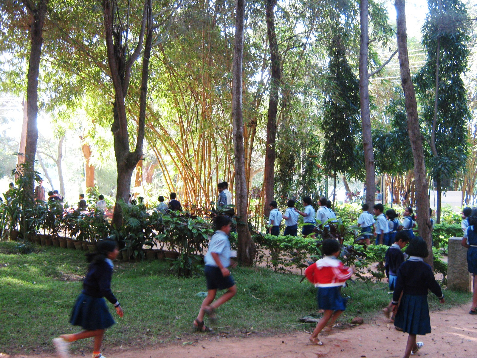 Karanji Lake, Mysore, India.